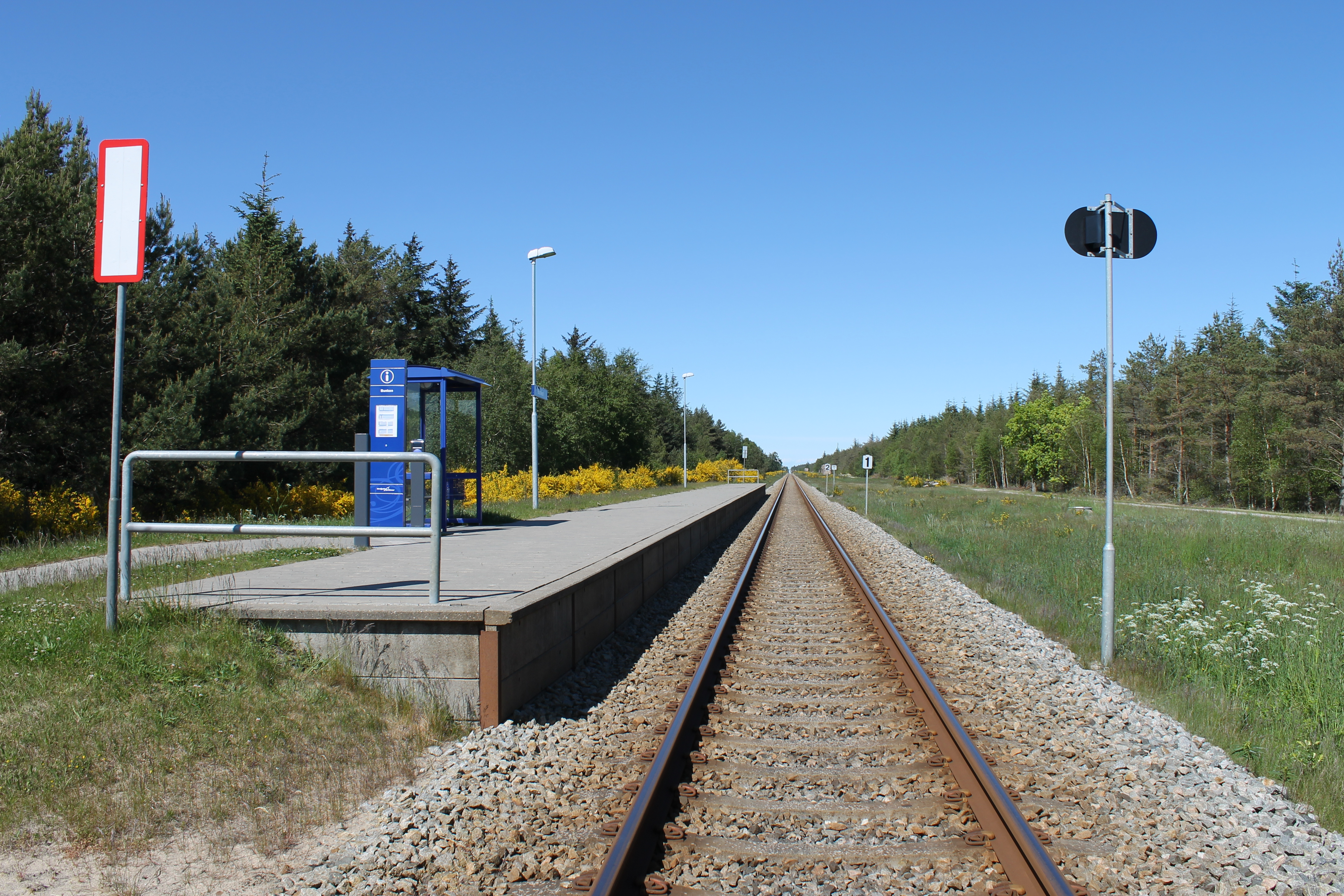 Skagensbanen - Bunken Trinbræt